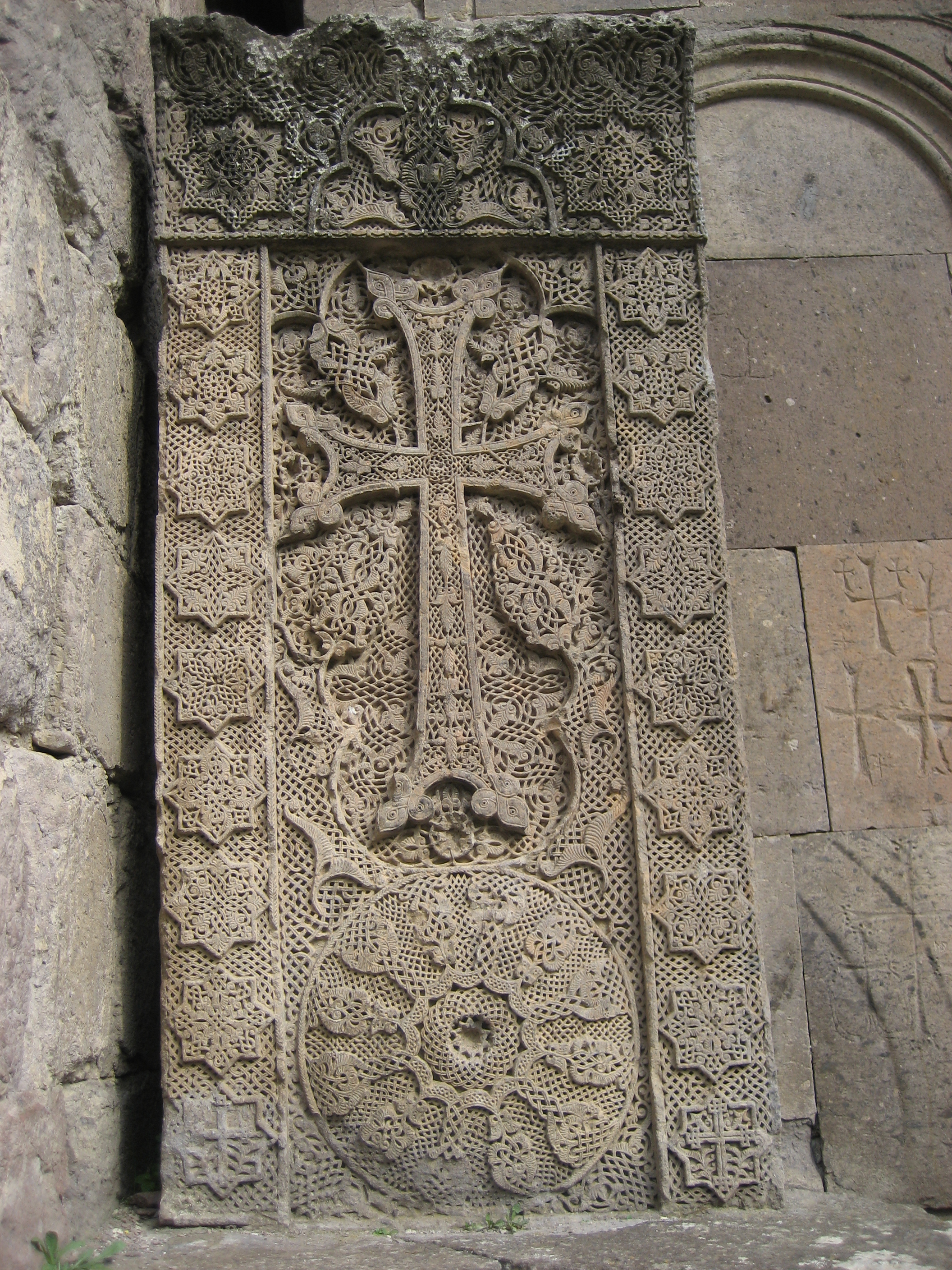 Khachkar at Goshavank Monastery